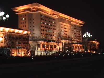 中文（中国大陆）: 滨海县政府